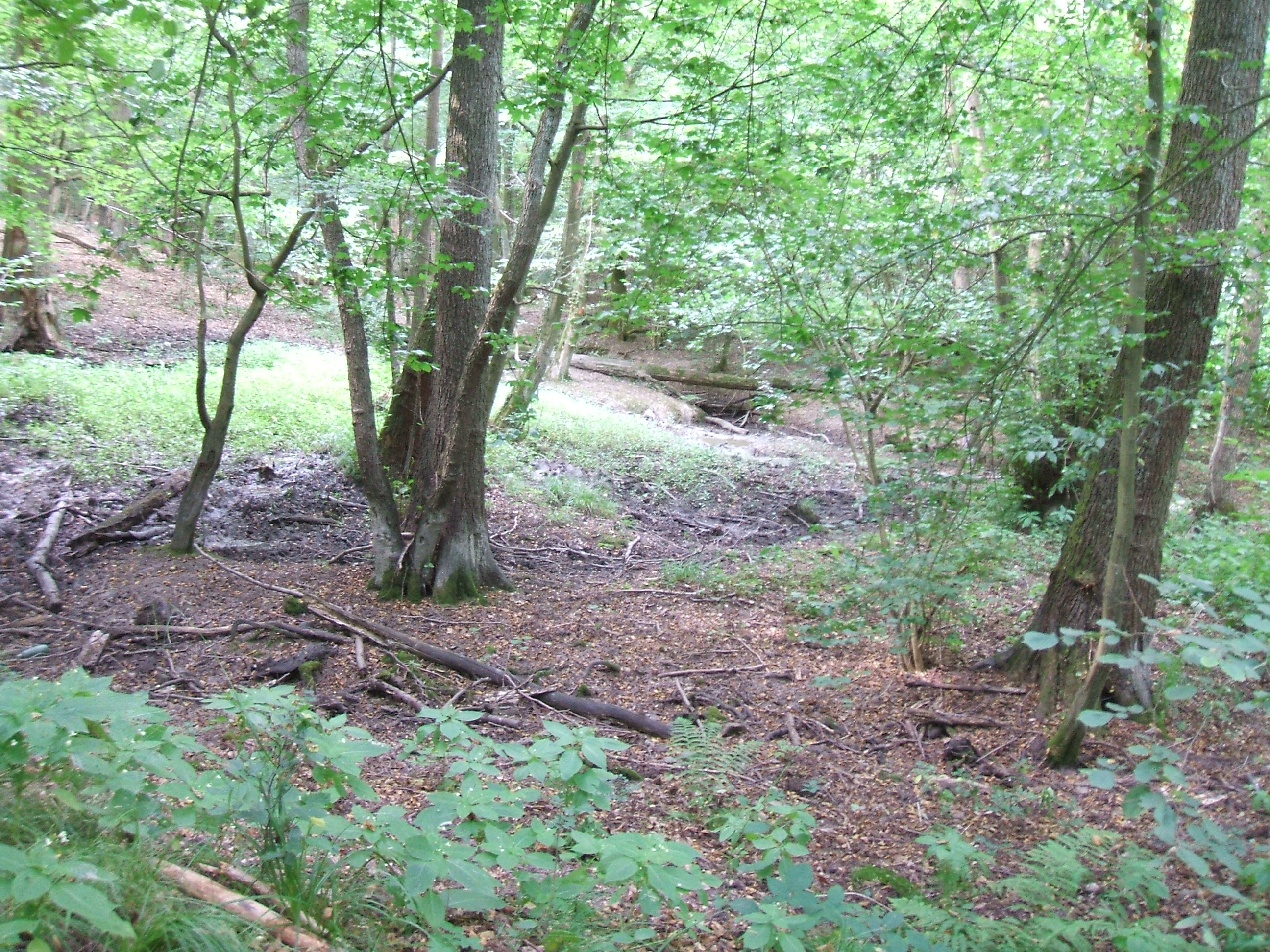 90°-Kurve des Schiefertalbachs nach Nordwesten am Ende seines Kerbtals